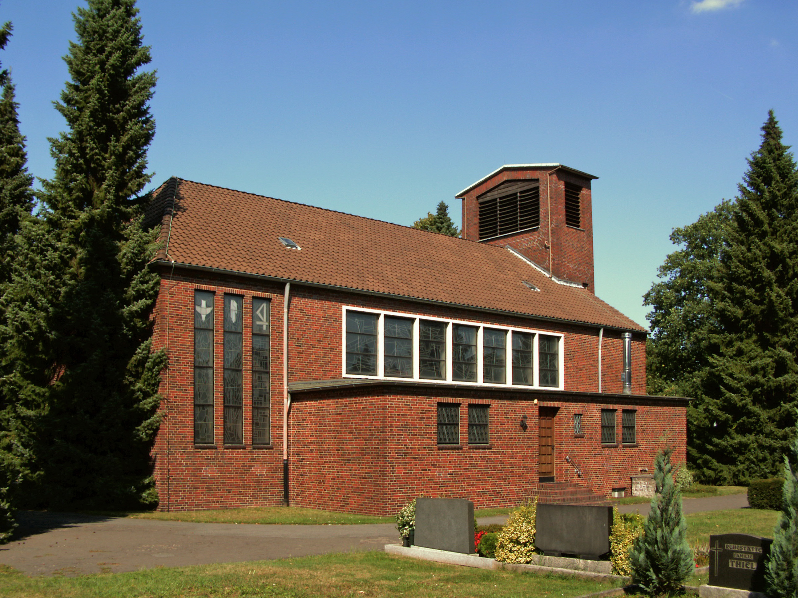 Katholische Kirche St. Barbara in Telgte, Ortsteil von Peine